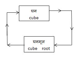 नेपाली: घन घन मूल